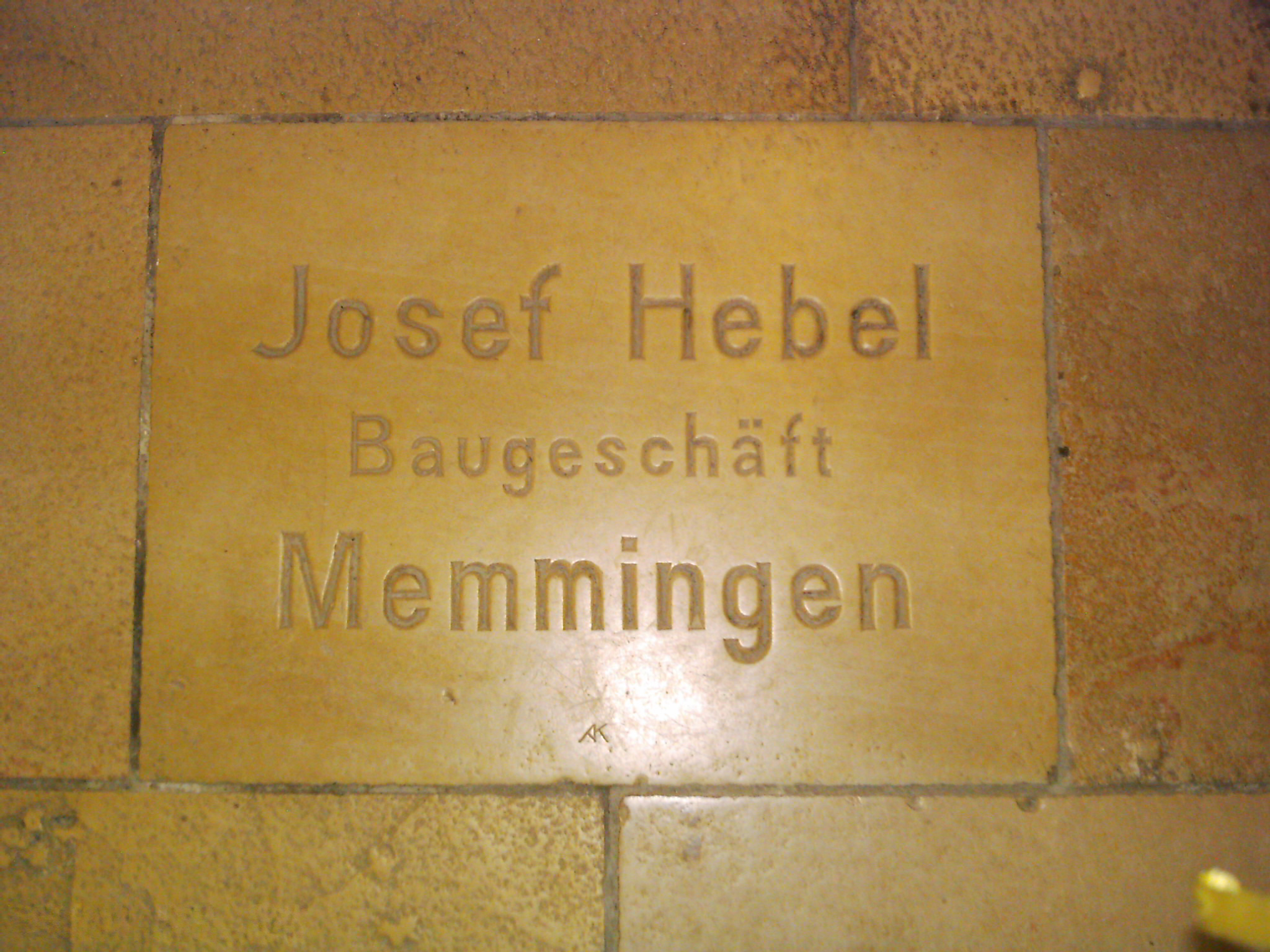 Römisch-Katholische Stadtpfarrkirche St. Josef in Memmingen, Erinnerungstafel an den Miterbauer Bauunternehmen Josef Hebel